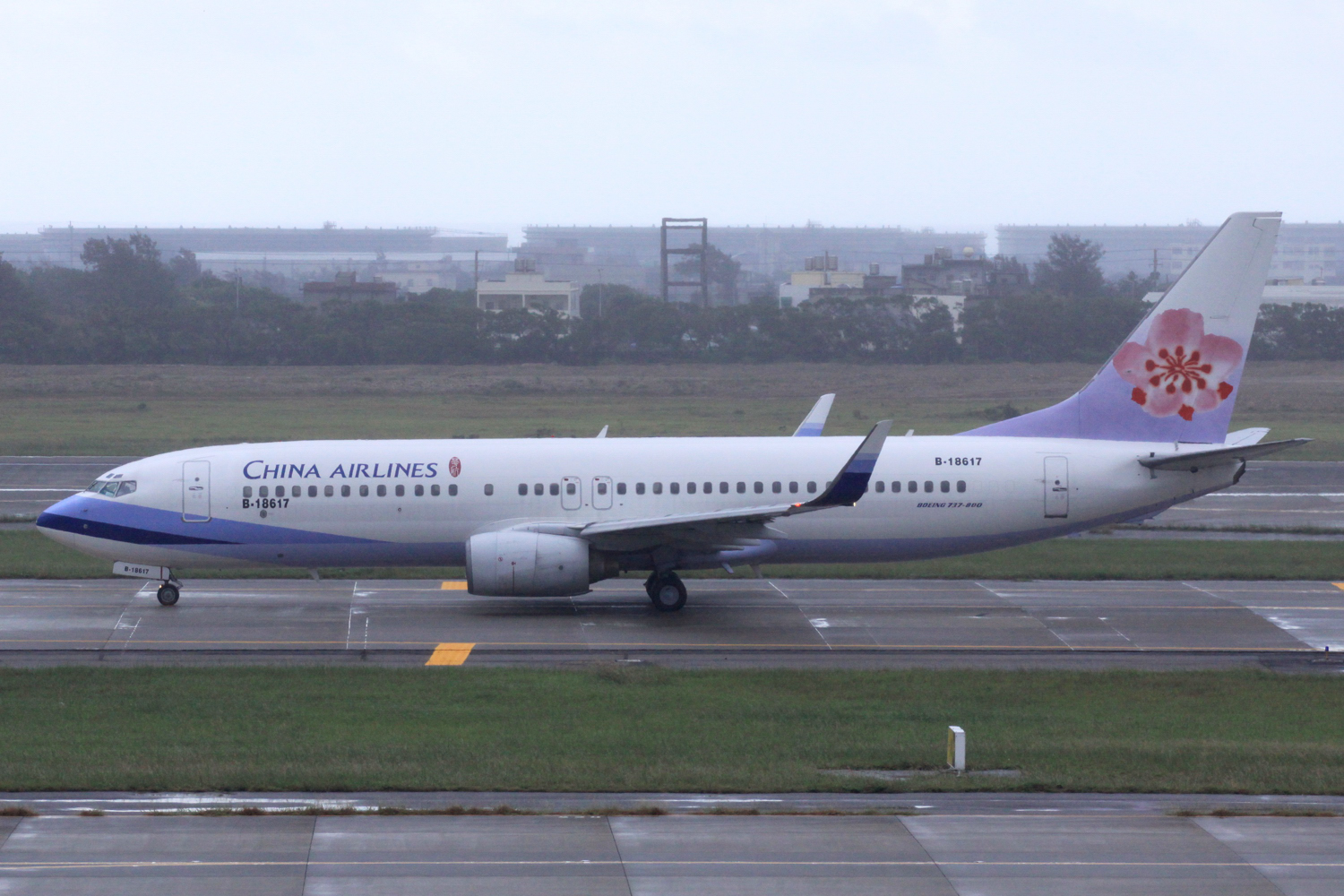 Taipei Taoyuan Airport